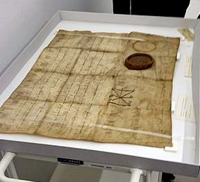 Urkunde von Kaiser Heinrich II., datiert auf den 21. Januar 1018, mittels derer die Übertragung eines Zehntbezirkes für die Abtei Burtscheid besiegelt wurde, im Stadtarchiv Aachen